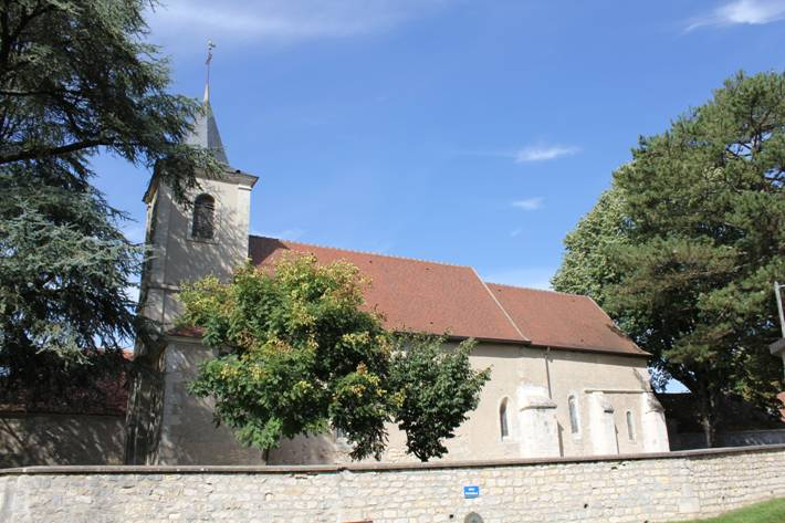 Eglise Saint Martin de La Marche